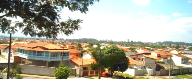 Vista da Zona Norte, a partir do Bairro Portal das Colinas, ao fundo a Zona Leste com o Pólo Industrial I